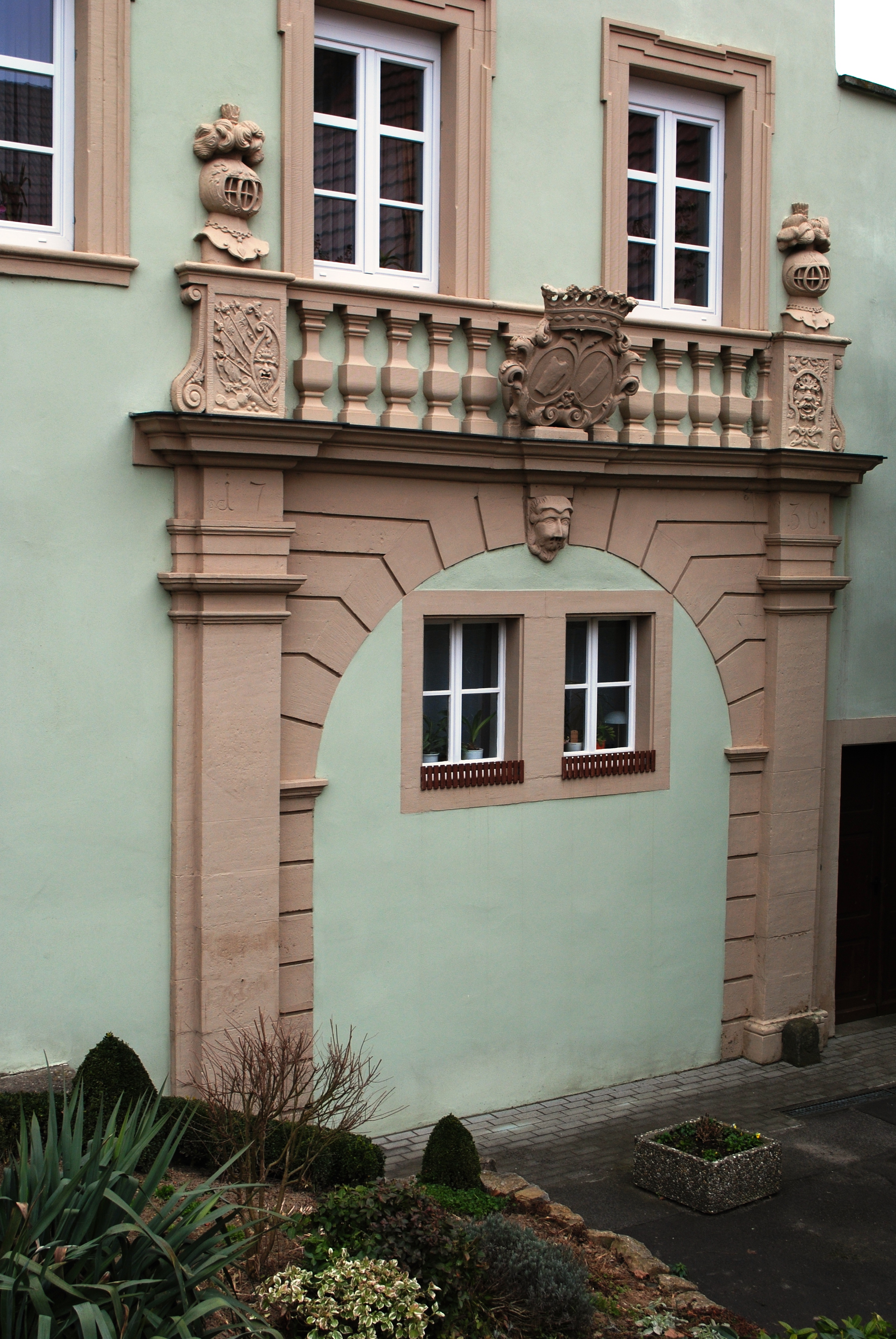 Tor, Schloss Krautheim, Volkach, zugesetzter Torbogen mit rustziertem Portal, bez. 1736, über älterem Kern des 15. Jh.; Allianzwappen des Carl Heinrich von Buttlar und der Juliana Maria Magdalena Wilhelmina von Buttlar, geb. ?